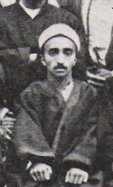 Mírzá Muhammad `Alí